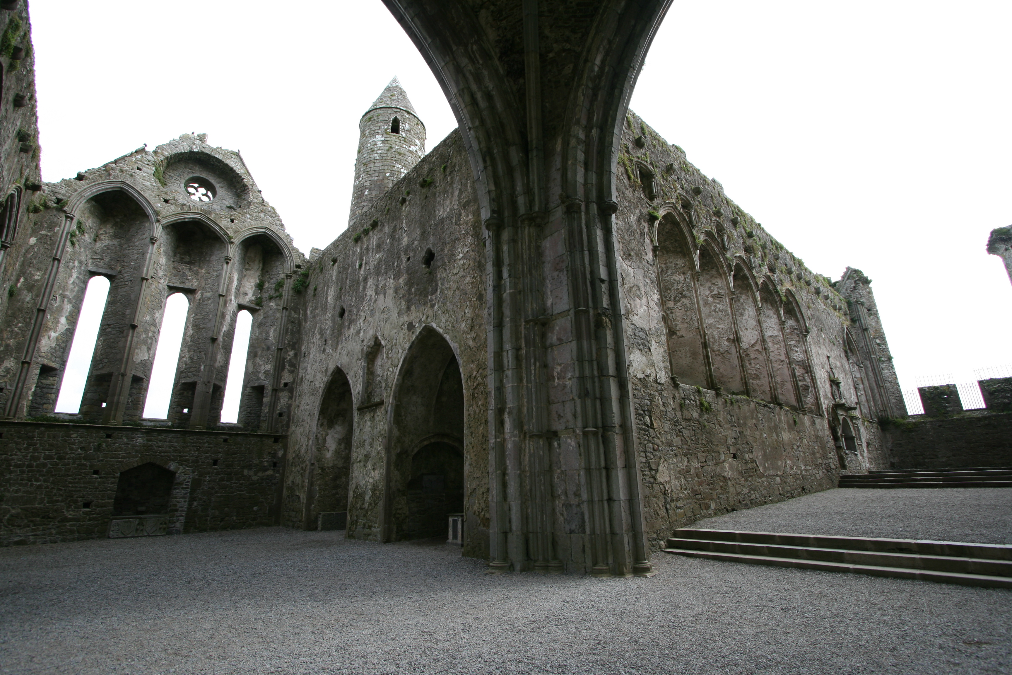 Rock of Cashel, ruinas de la catedral, condao de Tipperary